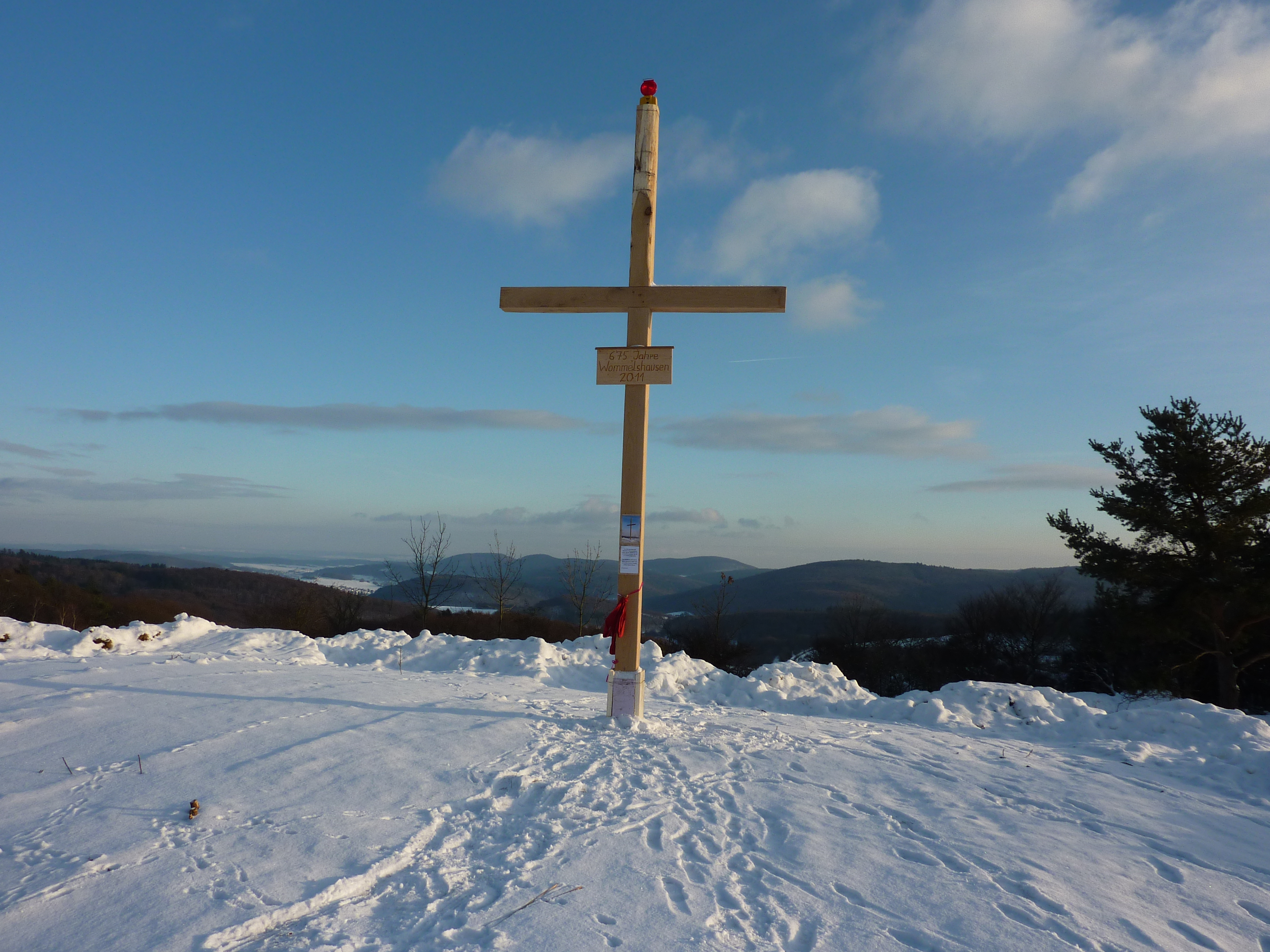 Gipfelkreuz anlässlich der 675-Jahrfeier von Bad Endbach-Wommelshausen, eingeweiht 31.12 2010